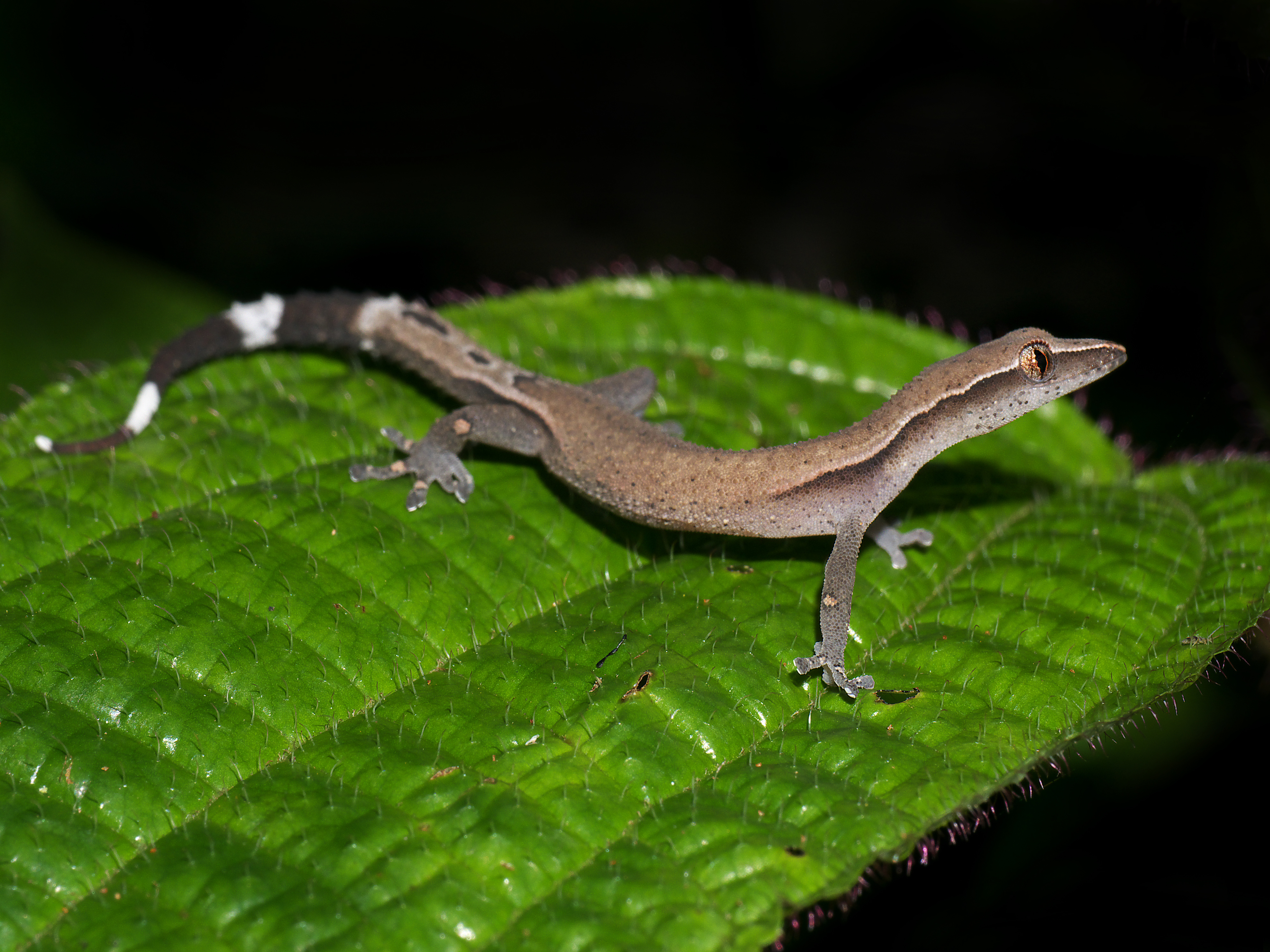 Madagascar clawless gecko (Ebenavia inunguis), Vohimana reserve, Madagascar